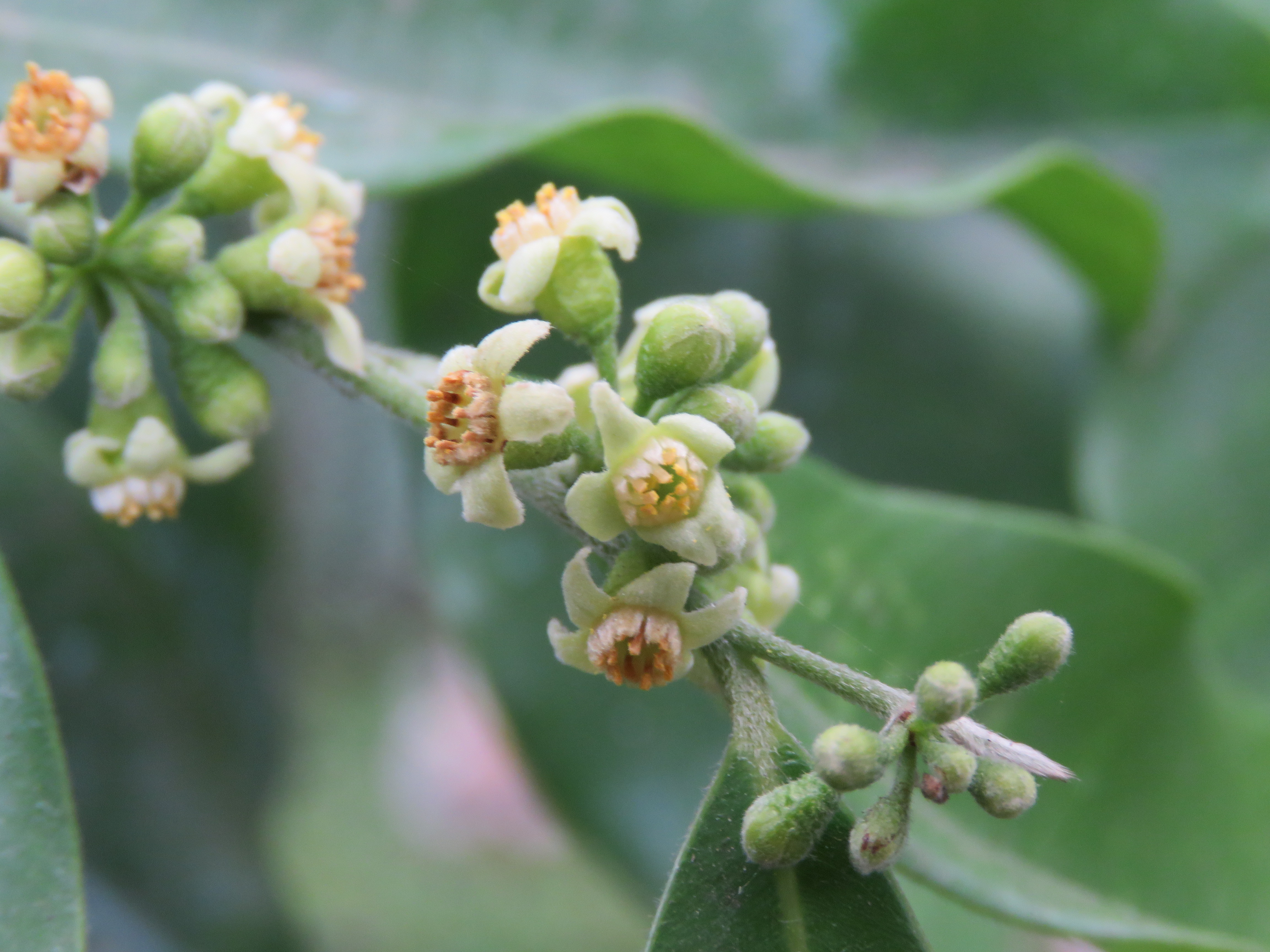 Photos by Vinayaraj